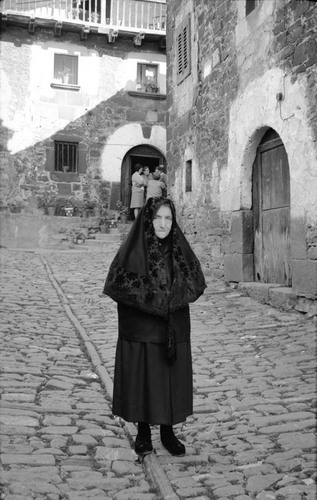 Izaba. Antonia Anaut Garde, Katalin-Garde Etxekoa. Erronkariko taika tipikoarekin jantzia. Izabako erronkariar euskalkia hitzegiten zuen azken hiztuna